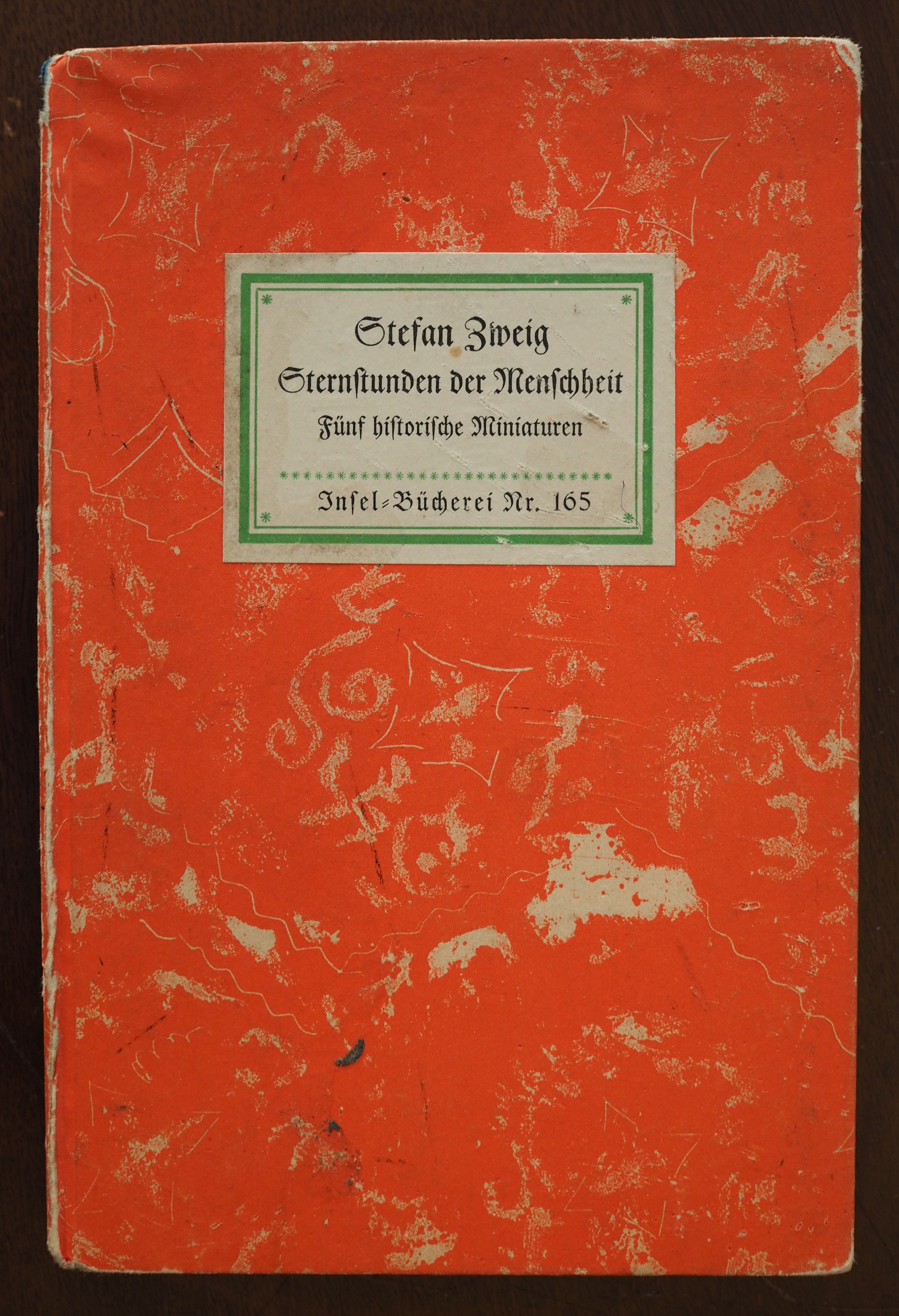 Buchdeckel: Zweig, Stefan: Sternstunden der Menschheit - Fünf historische Miniaturen, Im Inselverlag zu Leipzig, ca. 1928, 161. - 200. tausend, Band 165, S.80